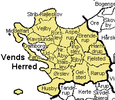 Vends Herred Odense Amt, Denmark. Map by Svend-Erik Christiansen, edited by user:Nico-dk .